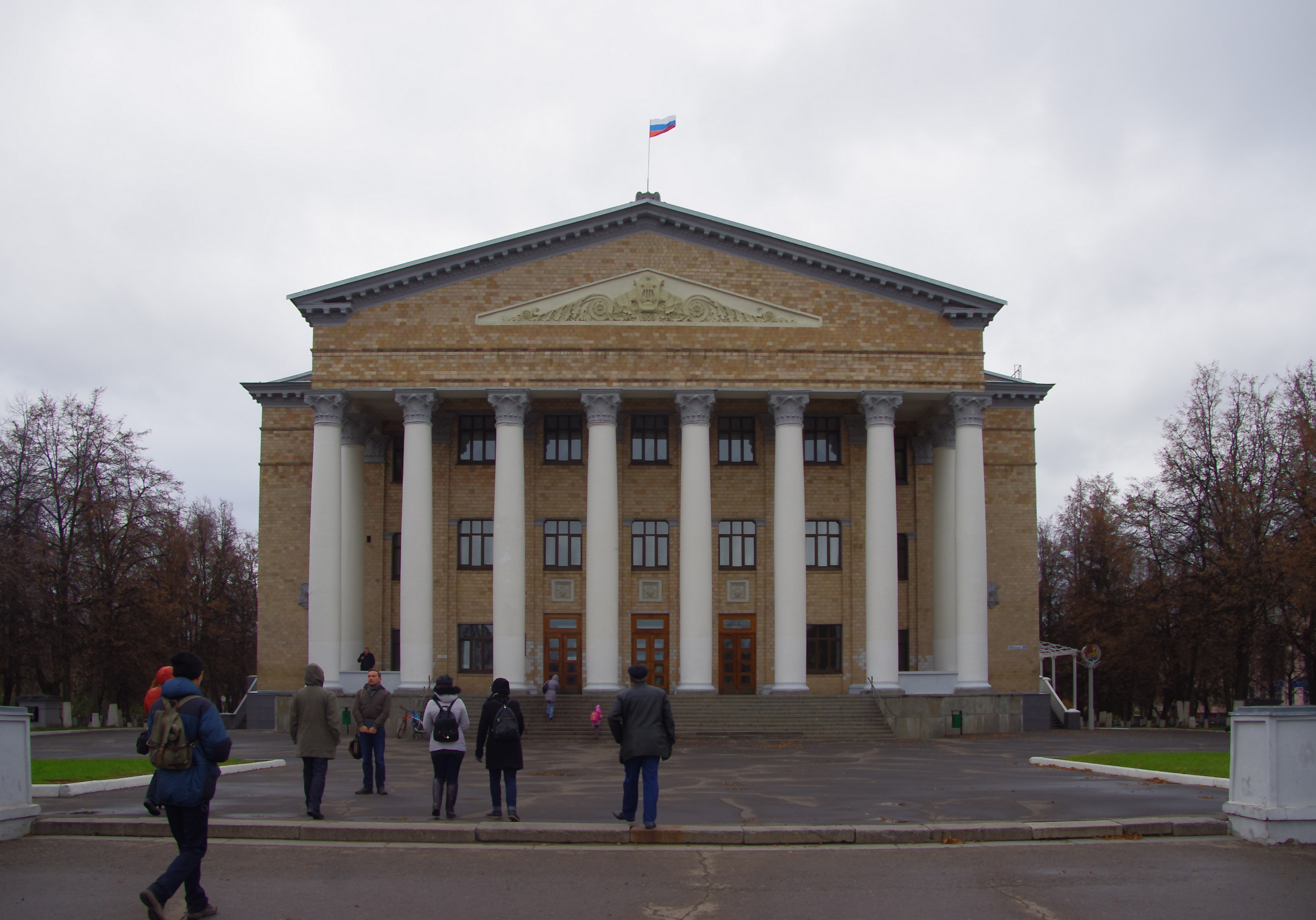 Zhukovskiy, Moscow Oblast, Russia